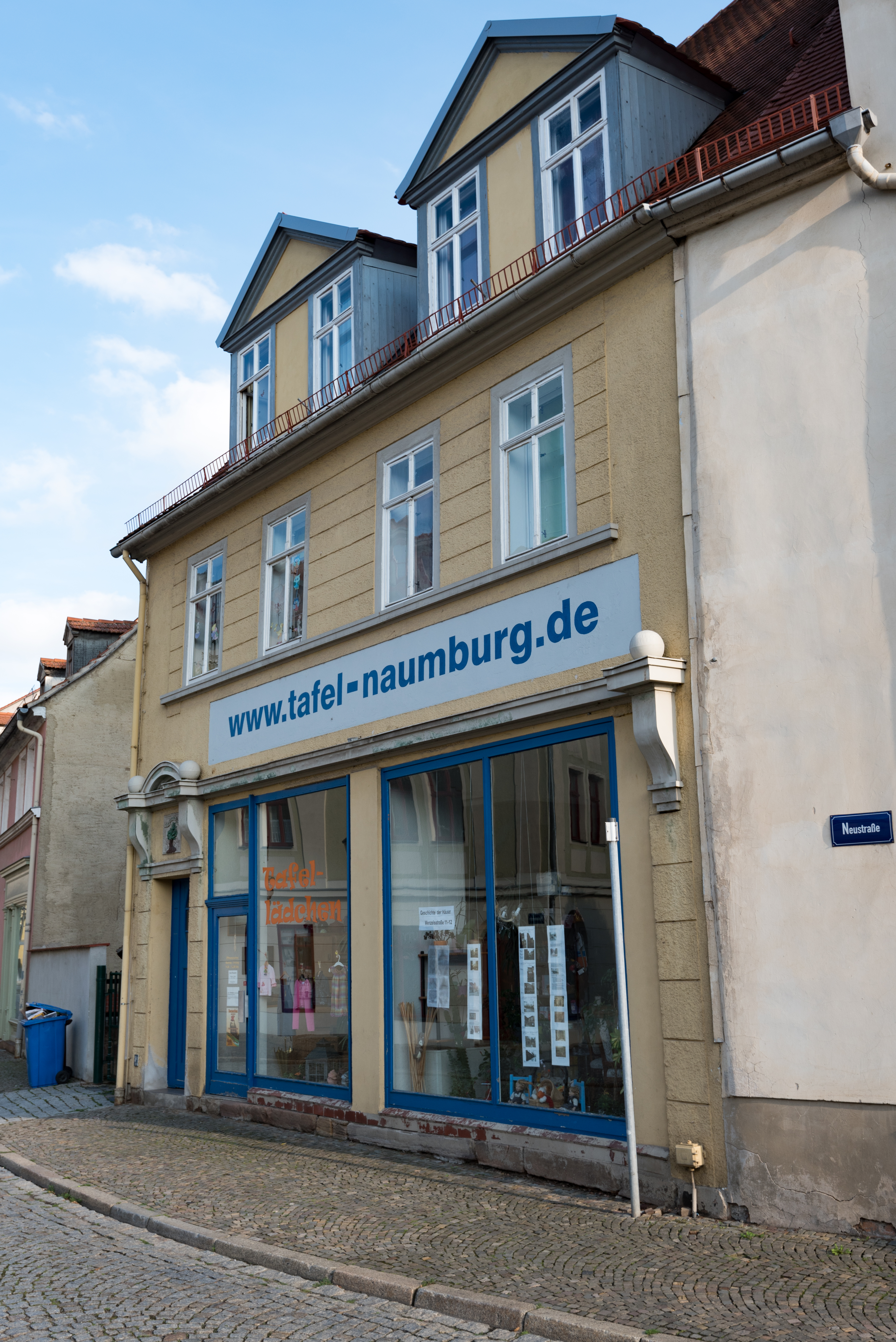 Naumburg (Saale), Wenzelsstraße 11